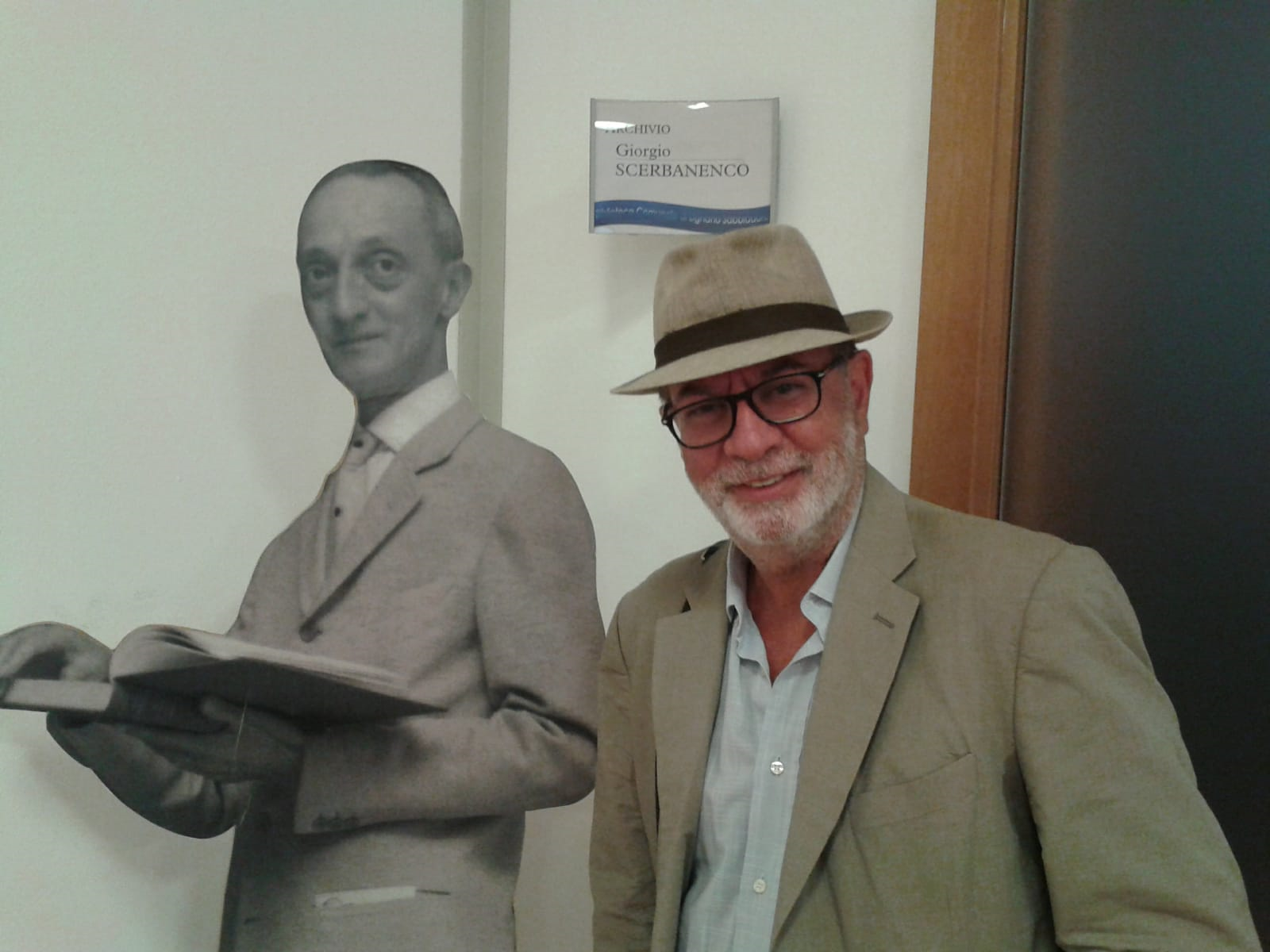 Lignano Noir Festival (2019)